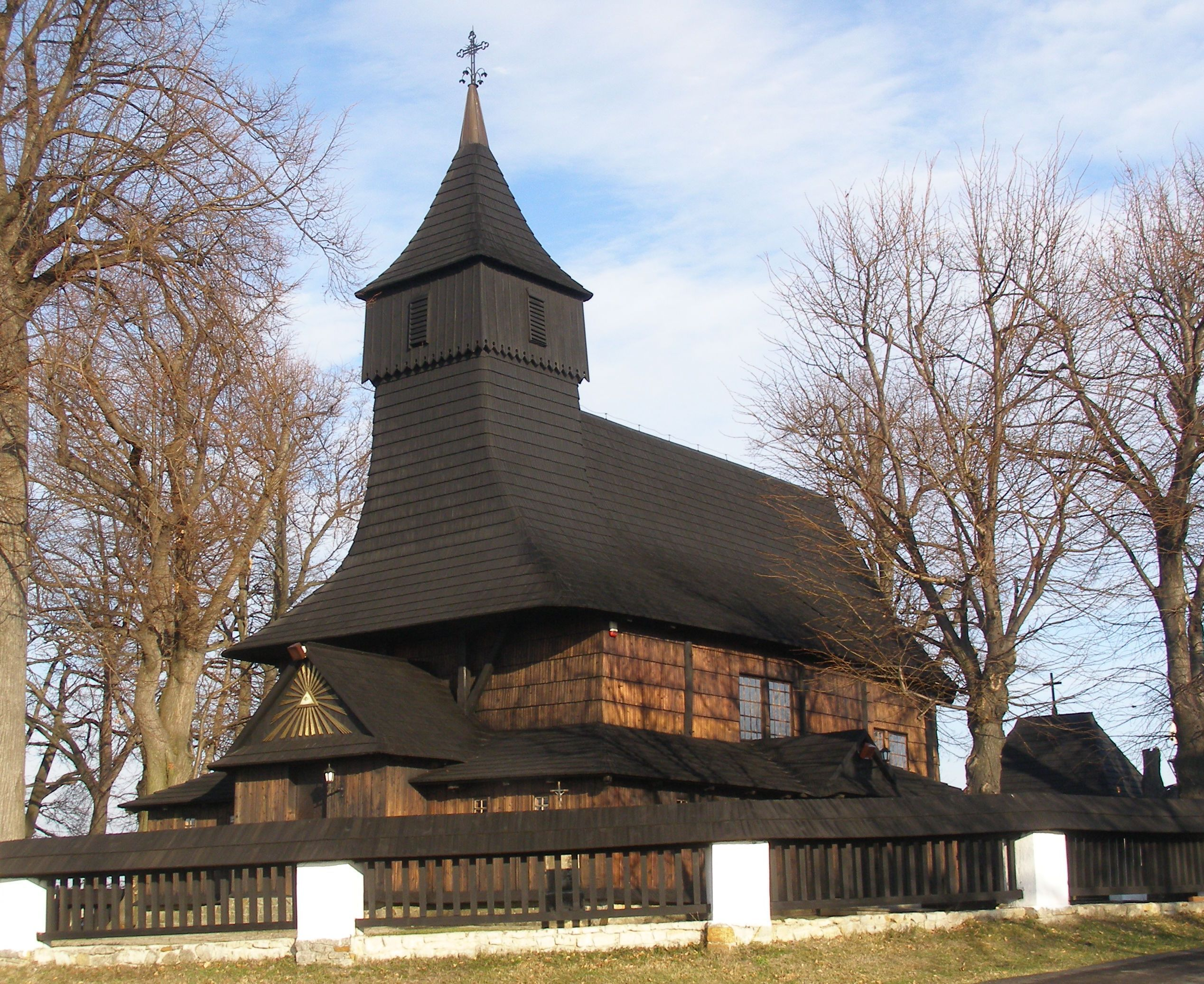 Zawada, kościół par. p.w. św. Marcina, XV, XVIII/XIX